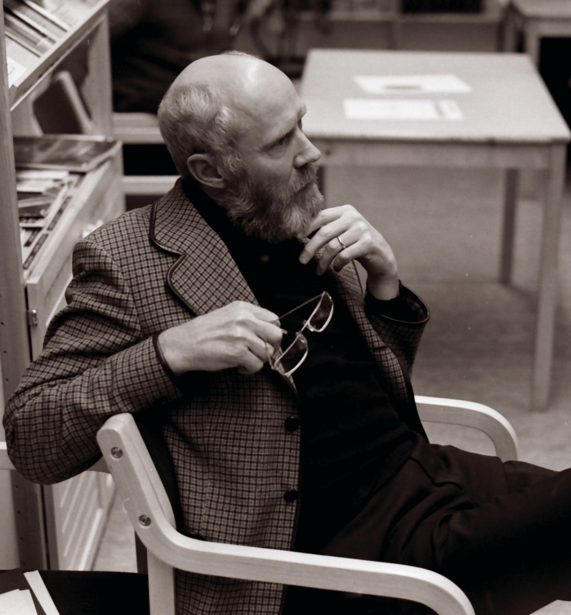 Eero Silvasti